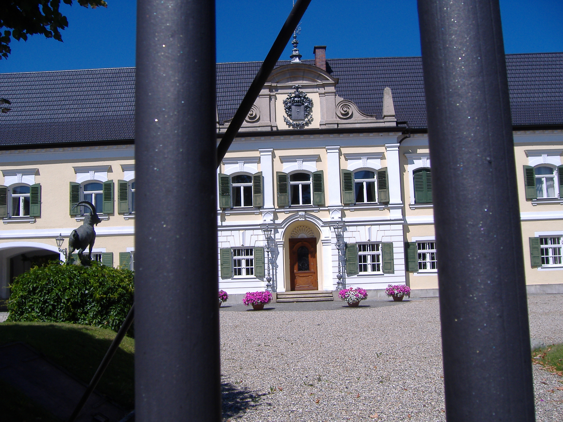 Schloss Kühbach